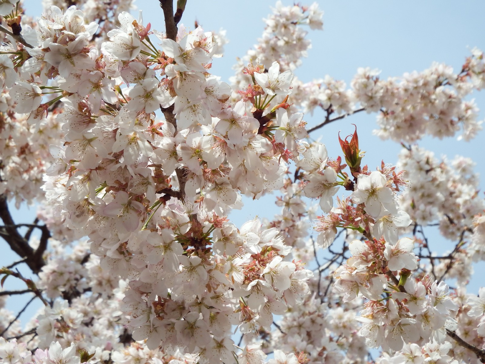 明正寺桜の枝